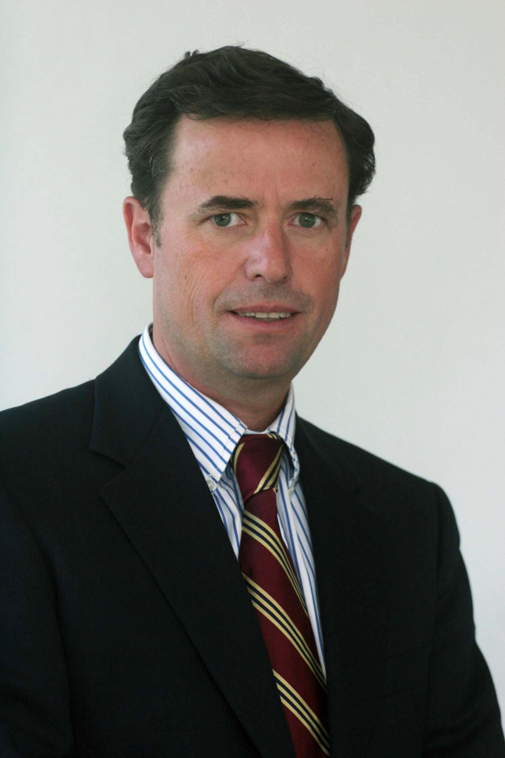 Fotografía del Ministro de Vivienda y Urbanismo de Chile, Rodrigo Pérez Mackenna.